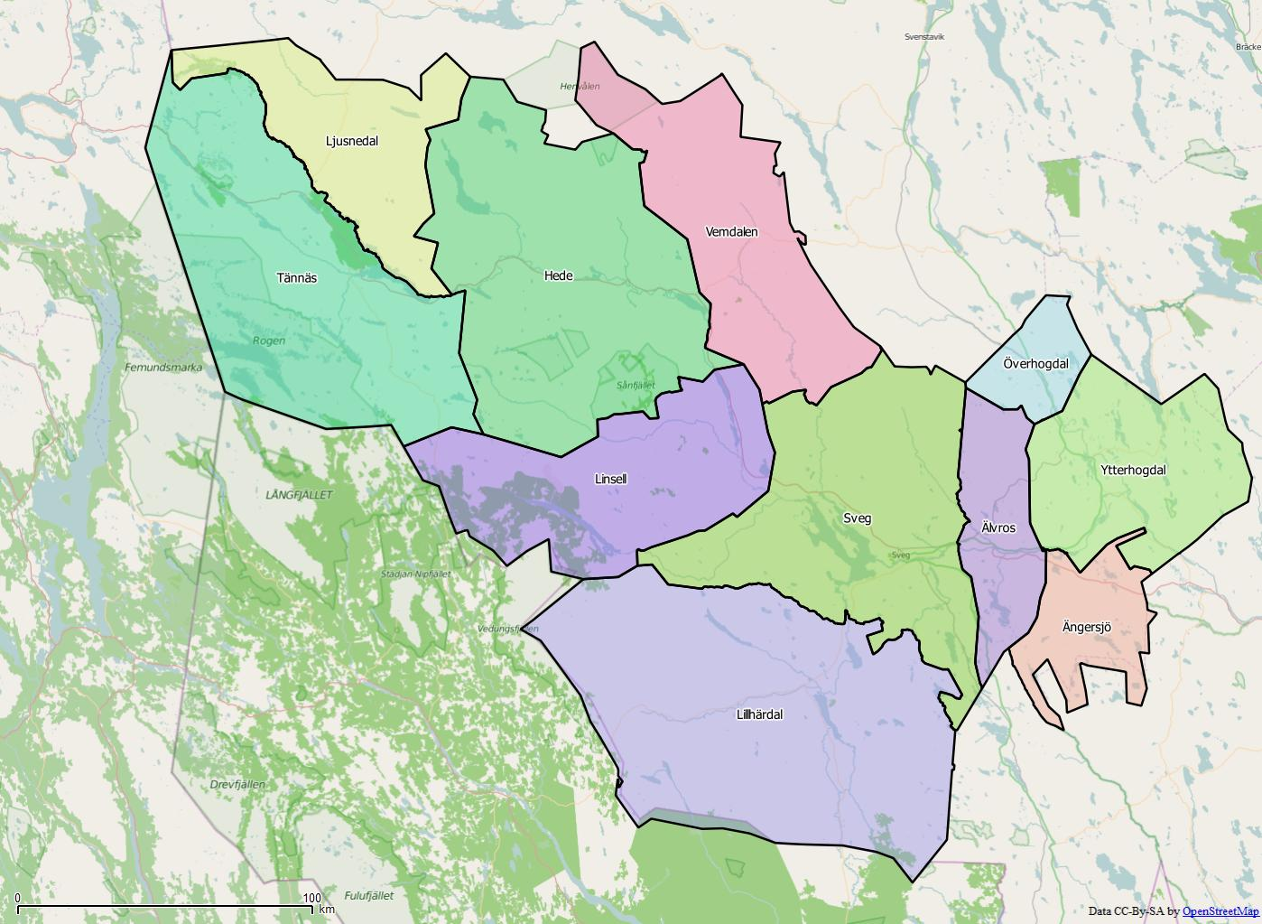 Distriktsindelningen i Härjedalens kommun